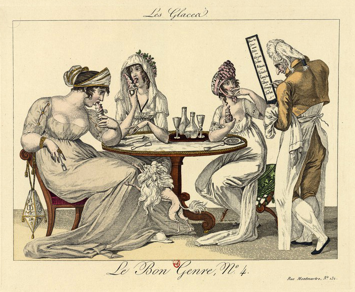 Gravure coloriée à la main de la série Le Bon Genre publiée par Pierre de la Mésangère.